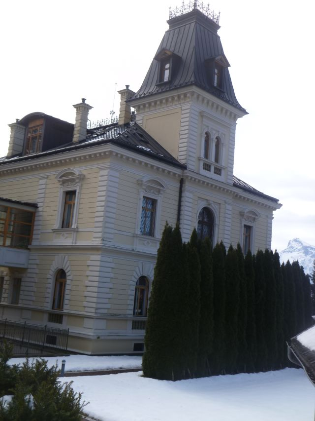 Villa_Schmederer-Hauptgebäude